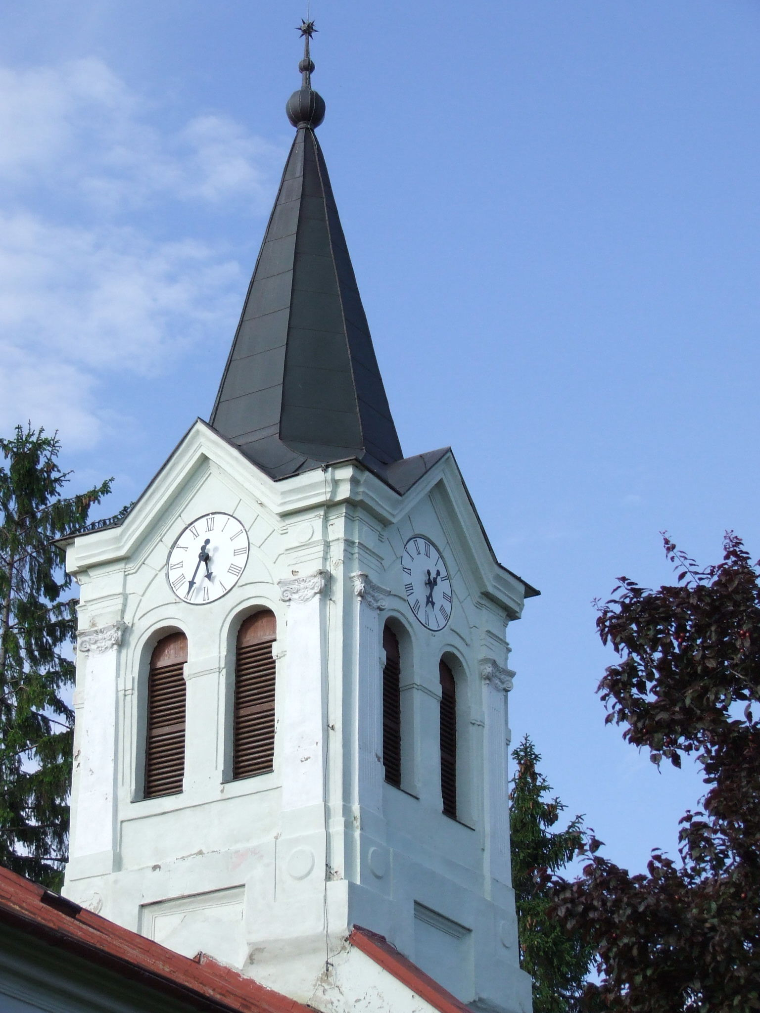 Kostol reformovanej kresťanskej cirkvi v Bardoňove